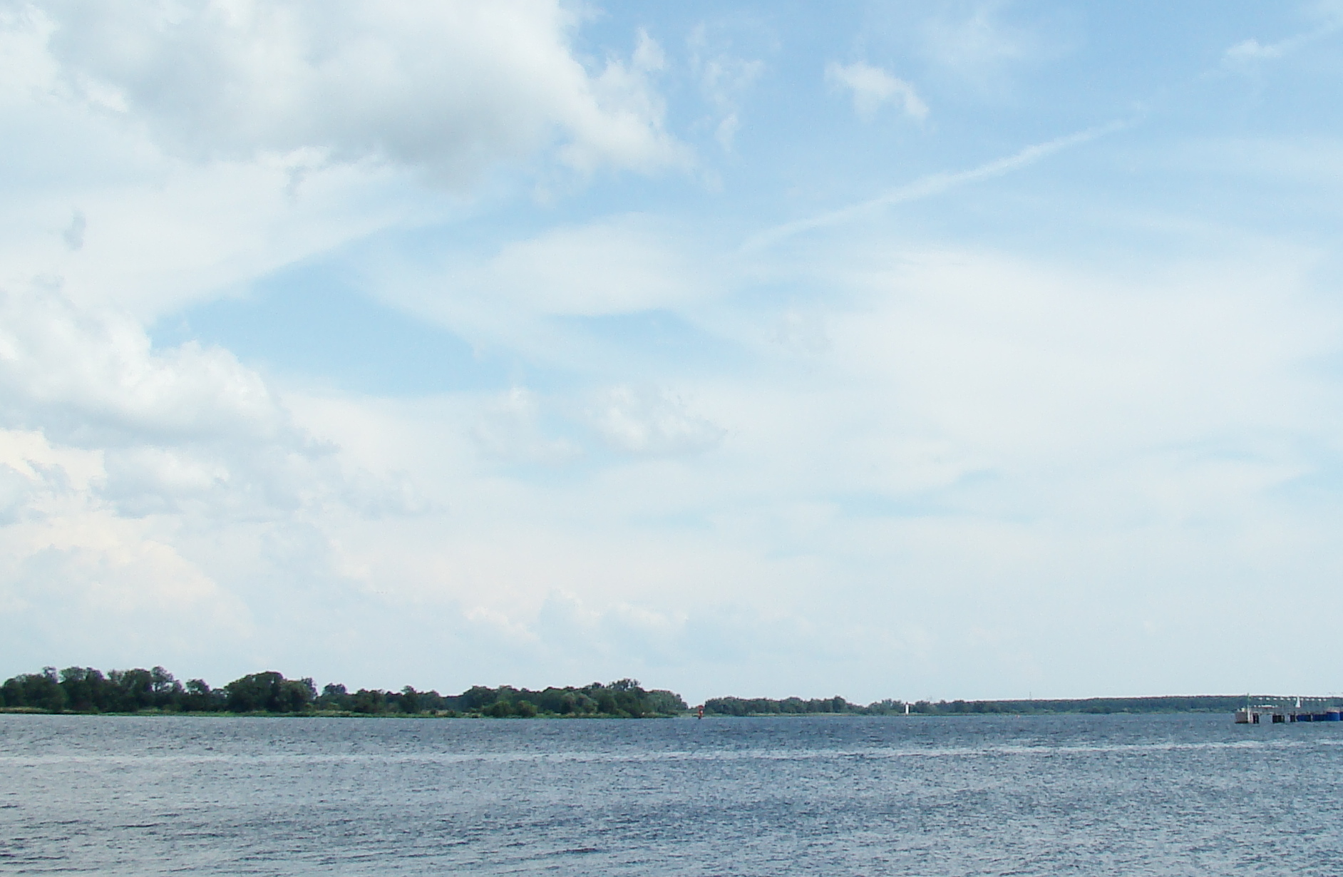 Odra-Domiąża, Województwo zachodniopomorskie, Polska